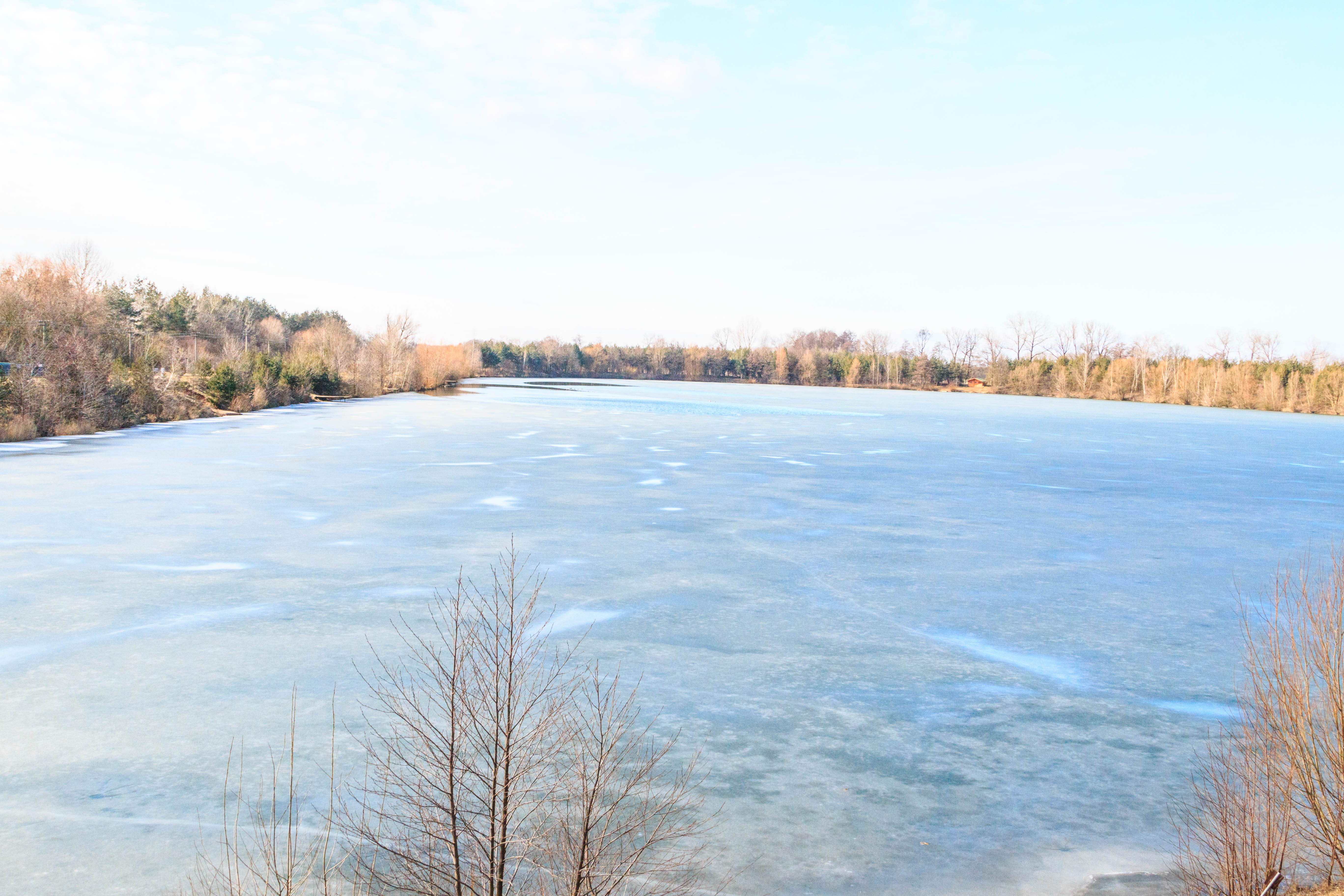 Písníky u Obědovic Project: Vodstvo.